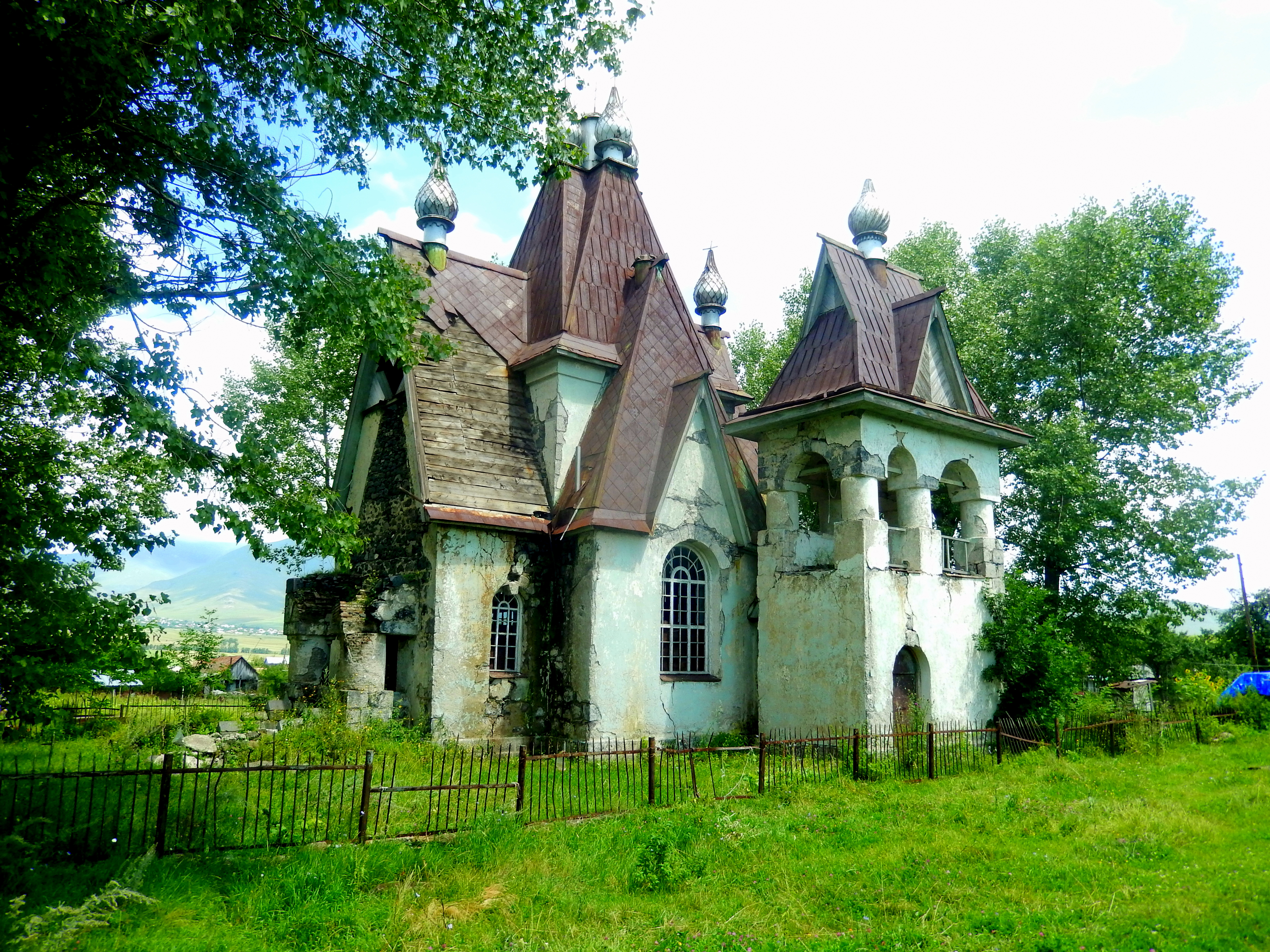 Սուրբ Նիկոլայ հրաշագործ եկեղեցի (Ամրակից) 13/4